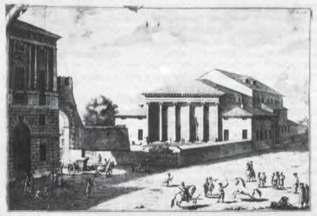 Il museo lapidario maffeiano intorno al 1730-1735